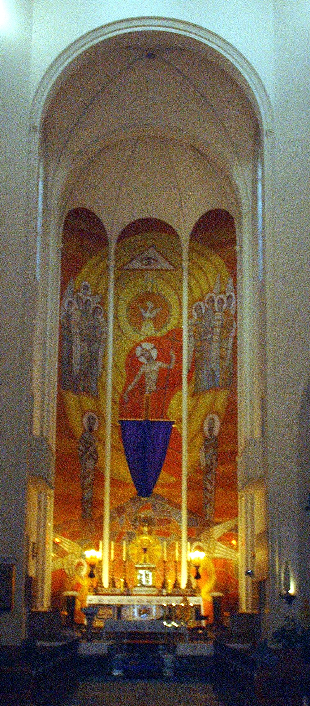 Ołtarz główny